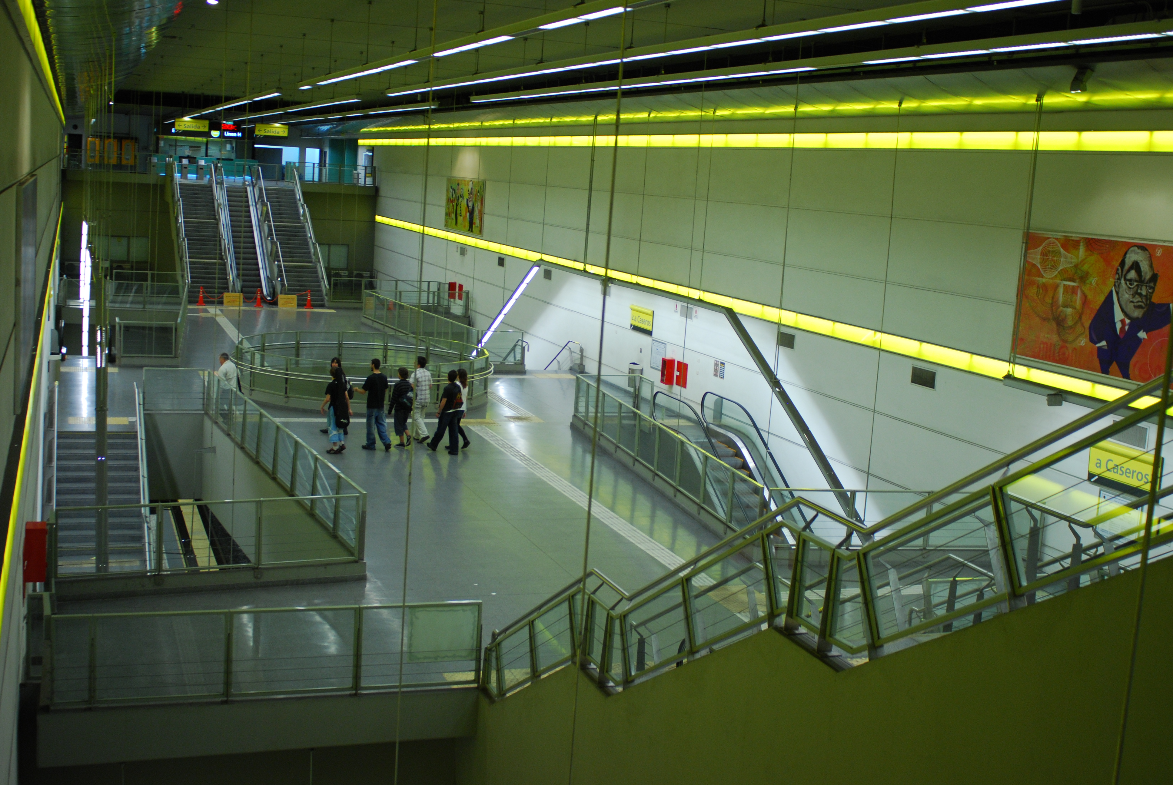 Línea H de subtes en Buenos Aires, entrepiso de la estación Humberto 1º (Argentina, noviembre 2008)